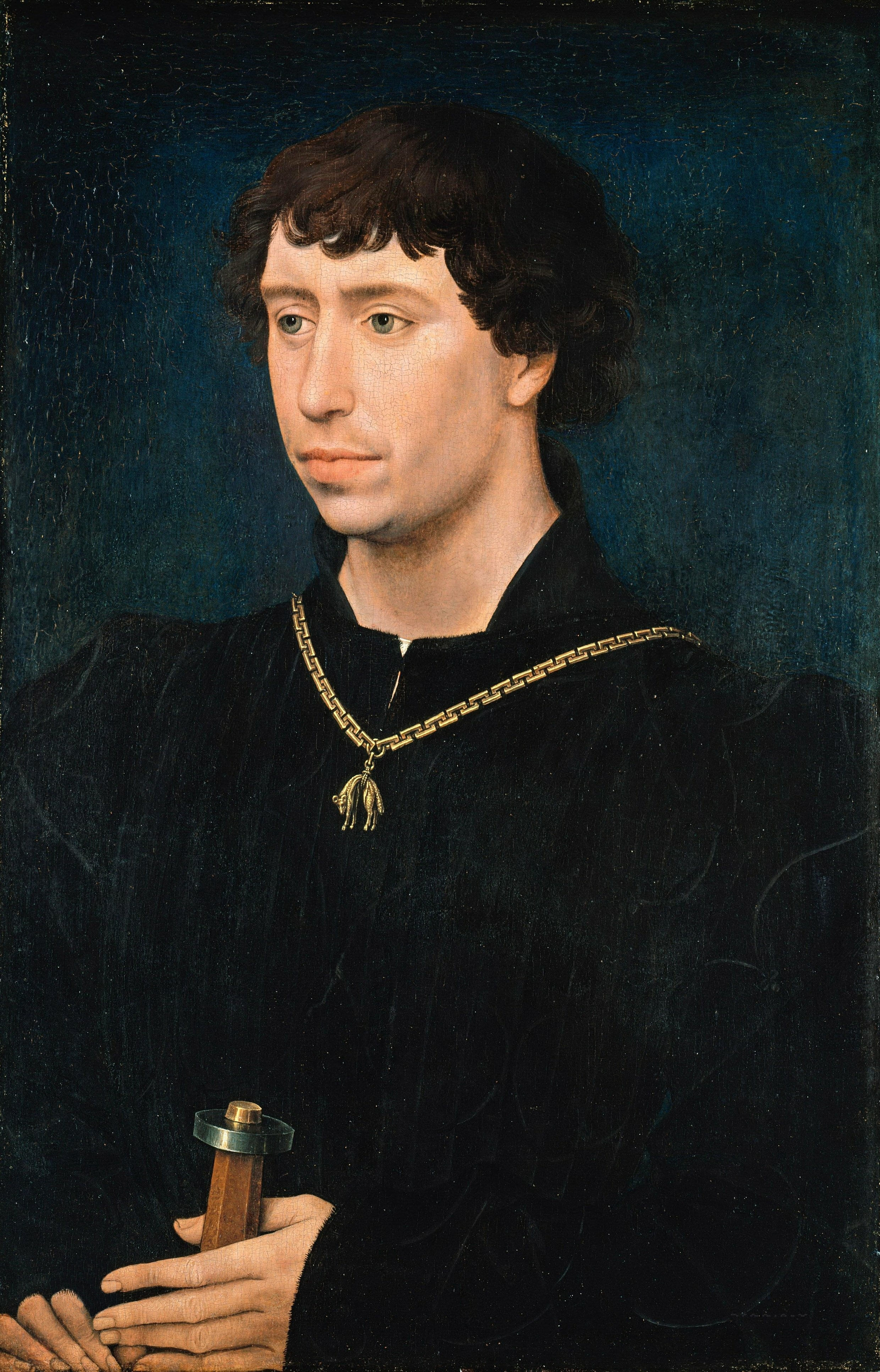 Karl der Kühne von Burgund (1433-1477), hier noch als Graf von Charolais dargestellt. Auf dieses Original beziehen sich alle weiteren Darstellung Karls als Herzog von Burgund